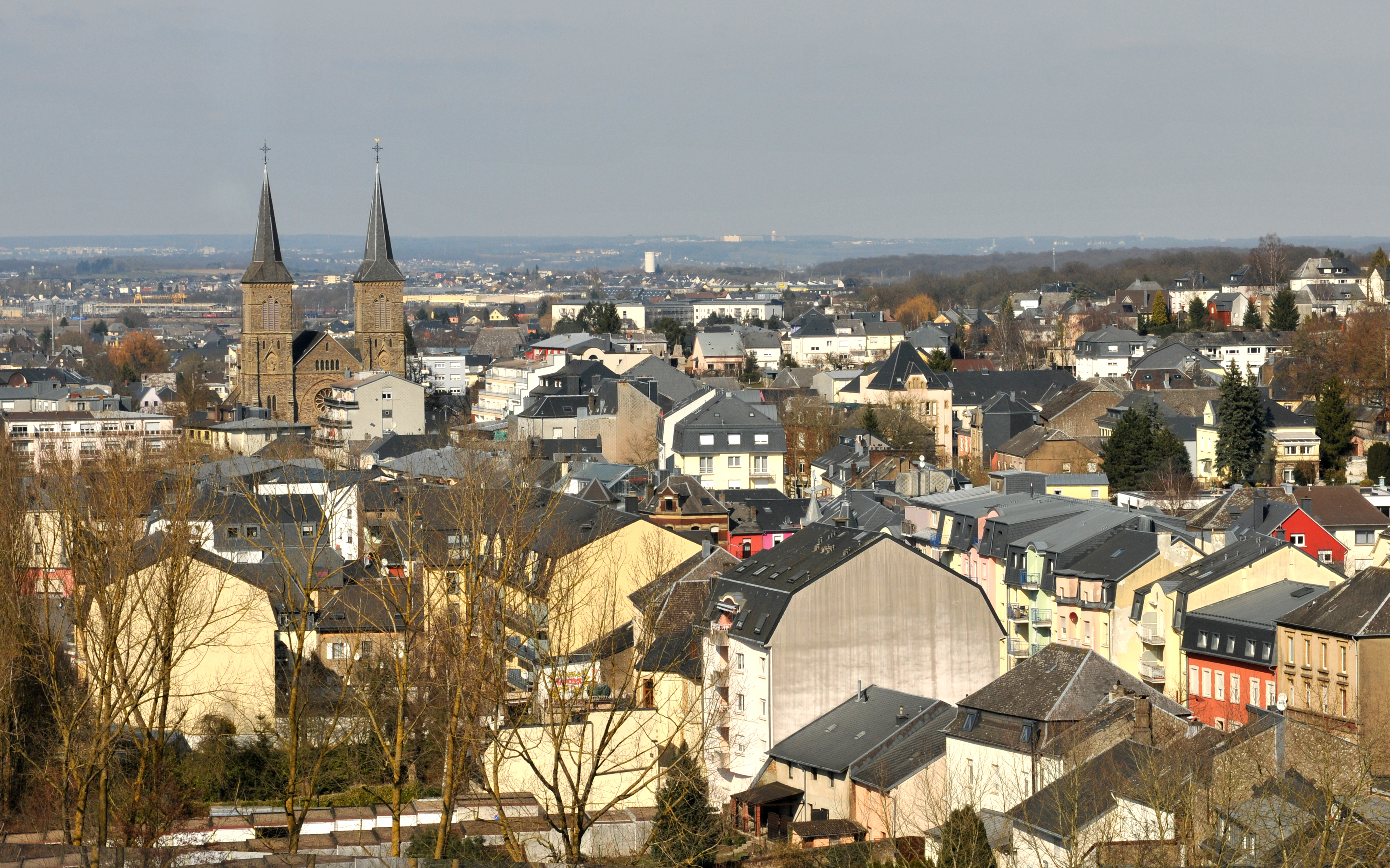 Vue op Diddeleng vum Waassertuerm + Pomhouse.